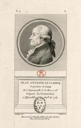 Jean Antoine Leclerc de Lannoy (1728-1812), laboureur et propriétaire à Launoy, député du tiers aux Etat-Généraux de 1789 par le bailliage de Vermandois